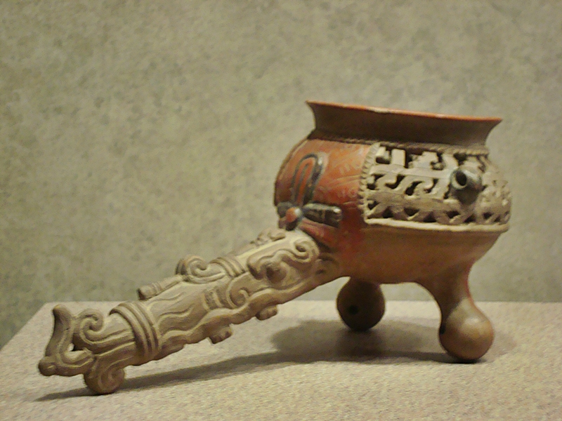 Sahumador realizado en cerámica con calados en forma de greca. El mango está adornado con volutas que representan el humo. Procede de la Mixteca Alta (Oaxaca), cultura mixteca, período Posclásico, colección del Museo Nacional de Antropología de México.